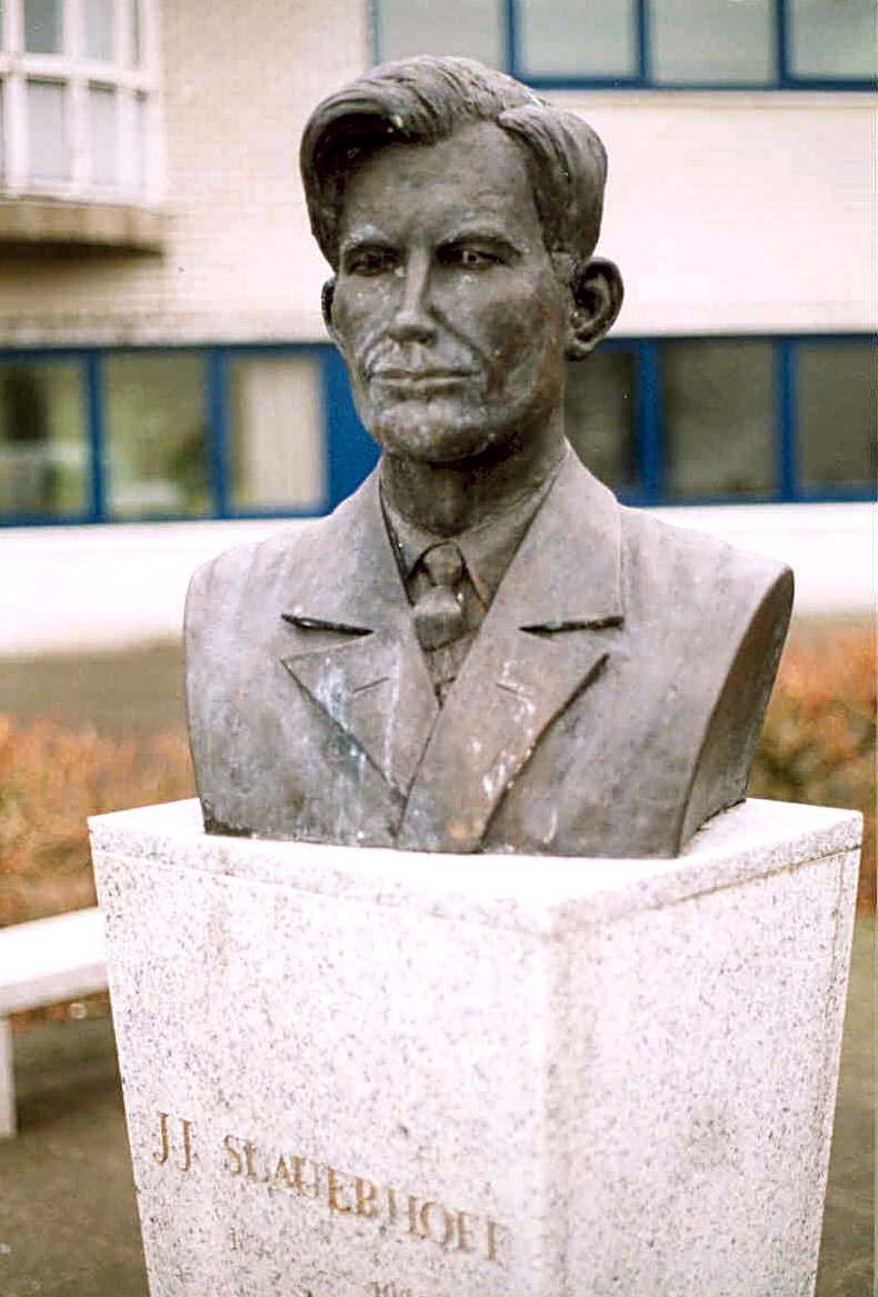 Ben van der Geest,1992